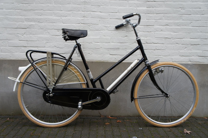 Gazelle Kwikstep 1966 (privé collectie Ed Collier)